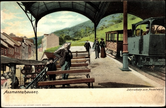 Talbahnhof der zwischen 1885 und 1917 verkehrenden Zahnradbahn von Assmannshausen zum Jagdschloss Niederwald